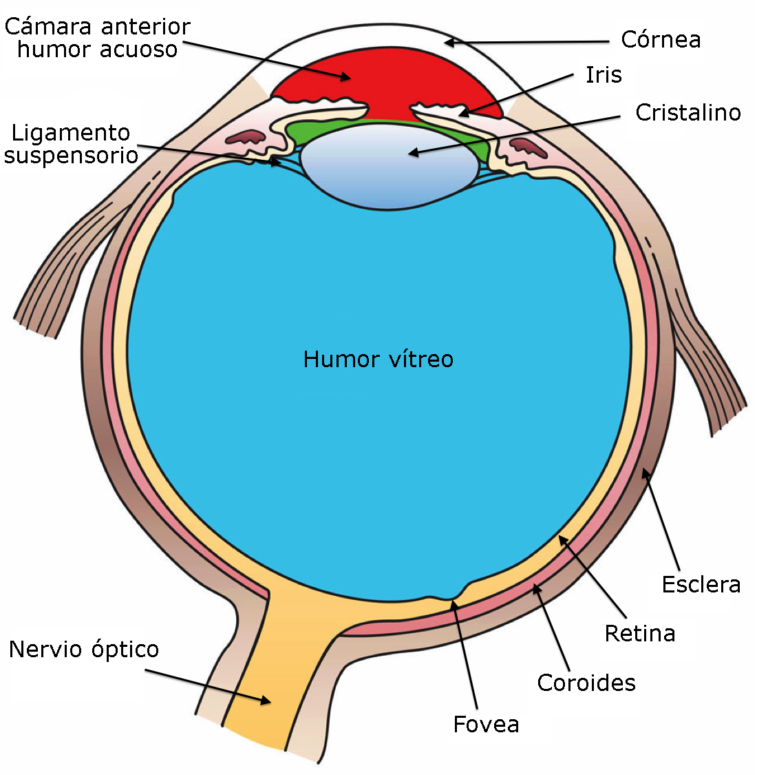 Sección del ojo humano en la que se muestran las principales estructuras que forman el órgano.